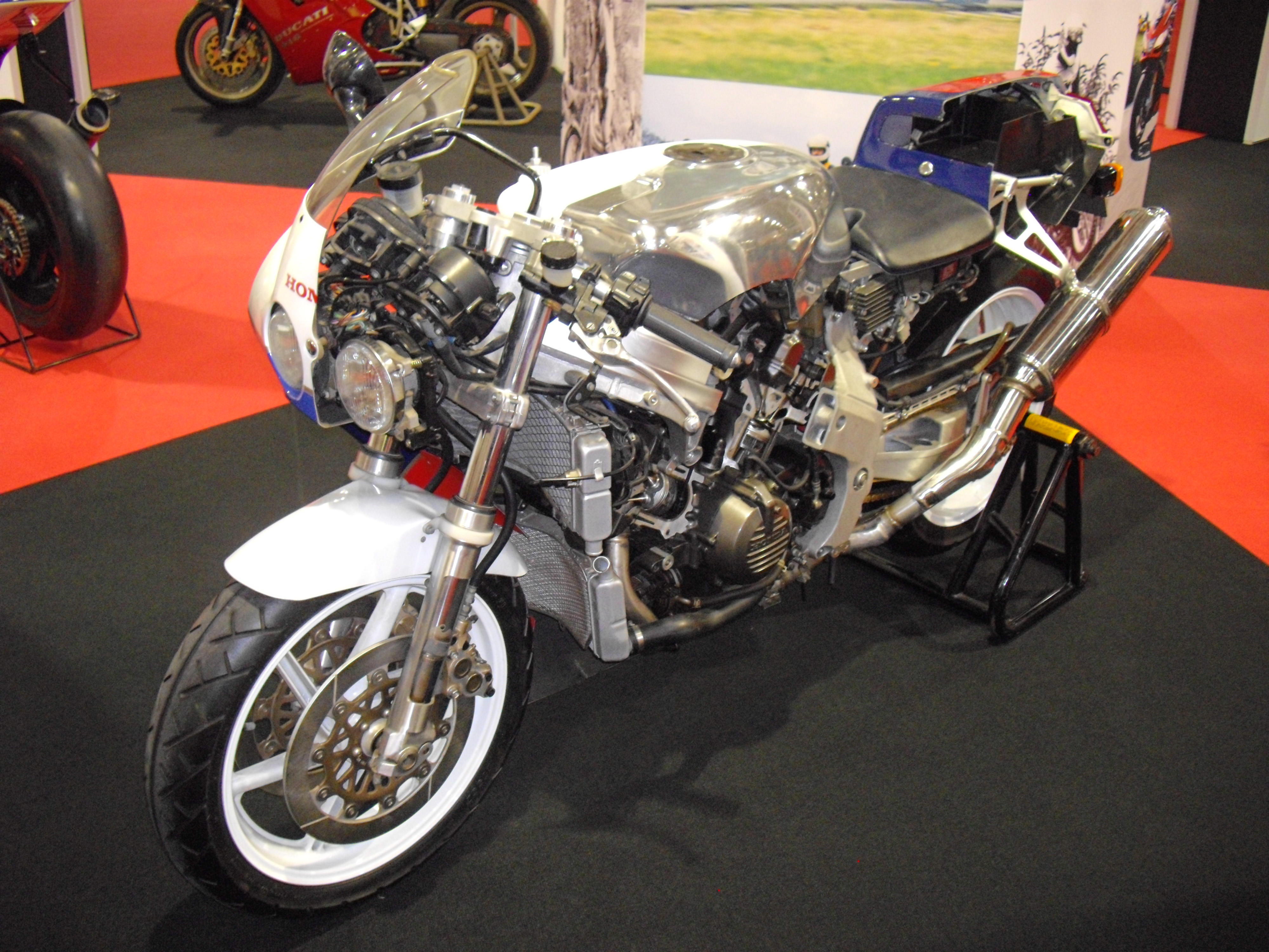 Honda VFR RC30